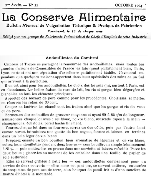 Texte de 1904 expliquant l'élaboration des andouillettes de Cambrai.